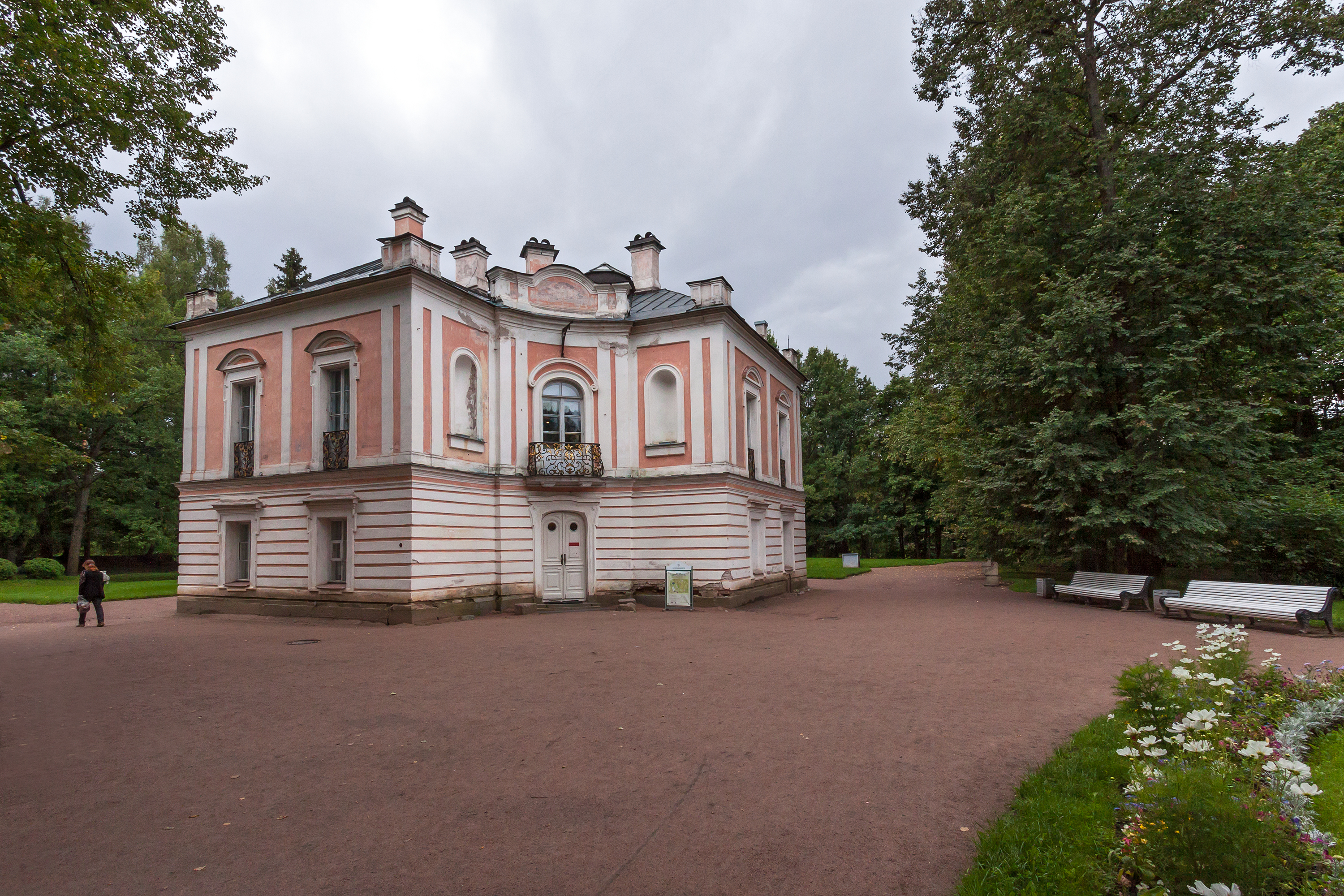 Дворец Петра III: Верхний парк, Ломоносов, Петродворцовый район, Санкт-Петербург